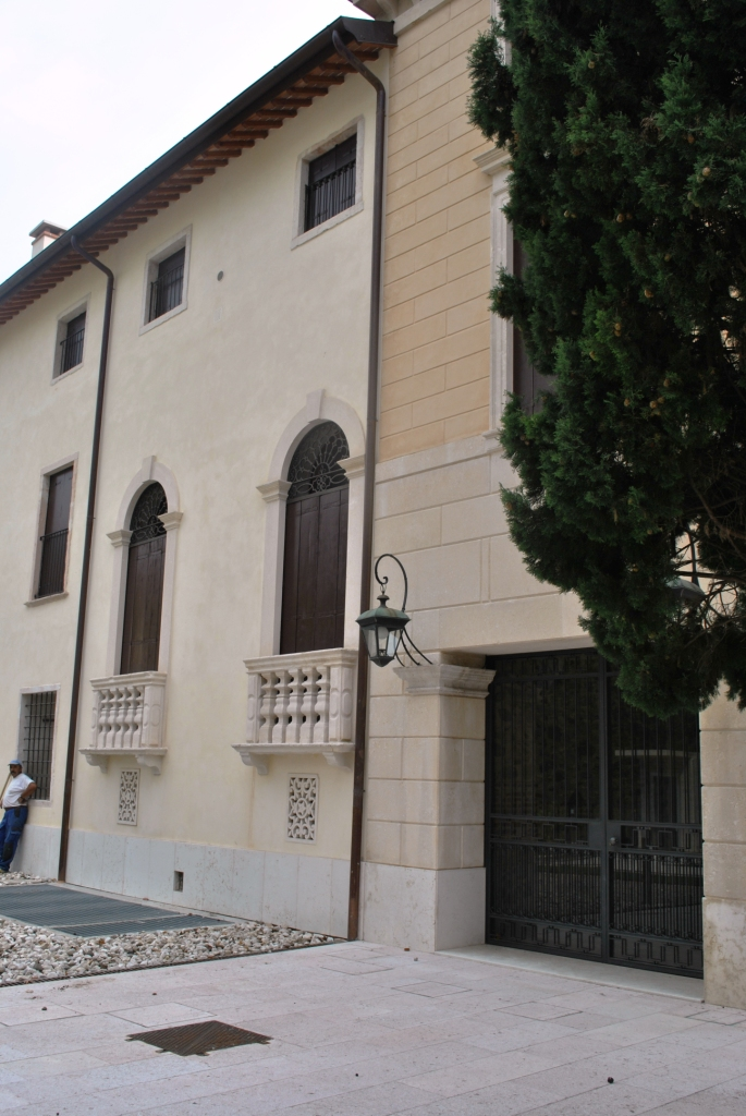 Piazza Alessandro Rossi This is a photo of a monument which is part of cultural heritage of Italy.